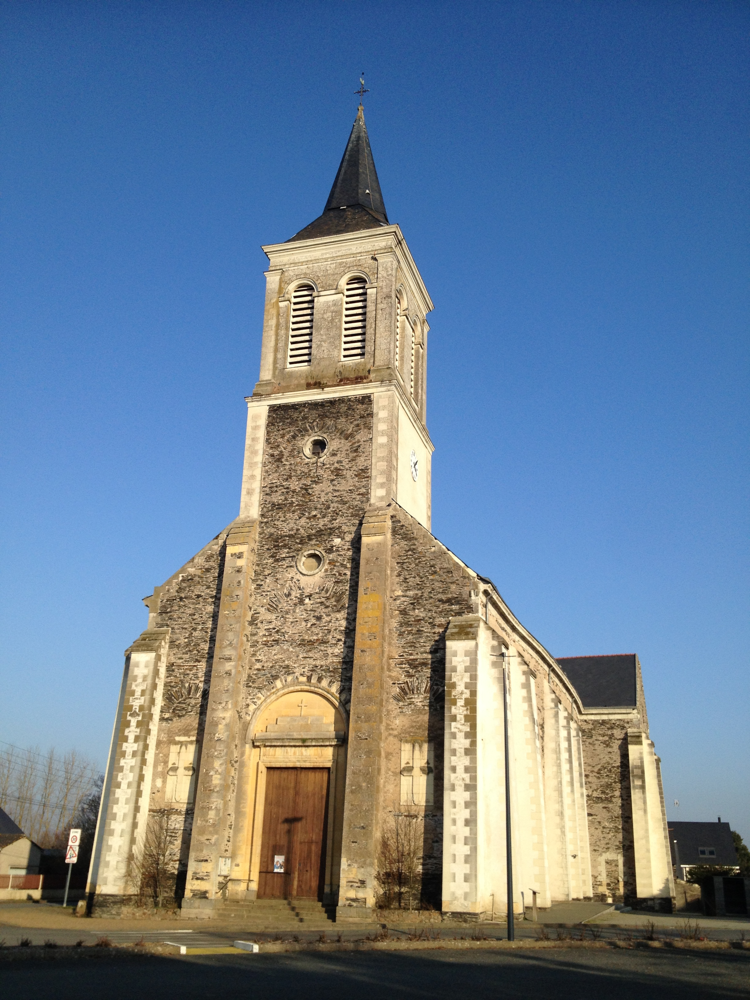 L'église.